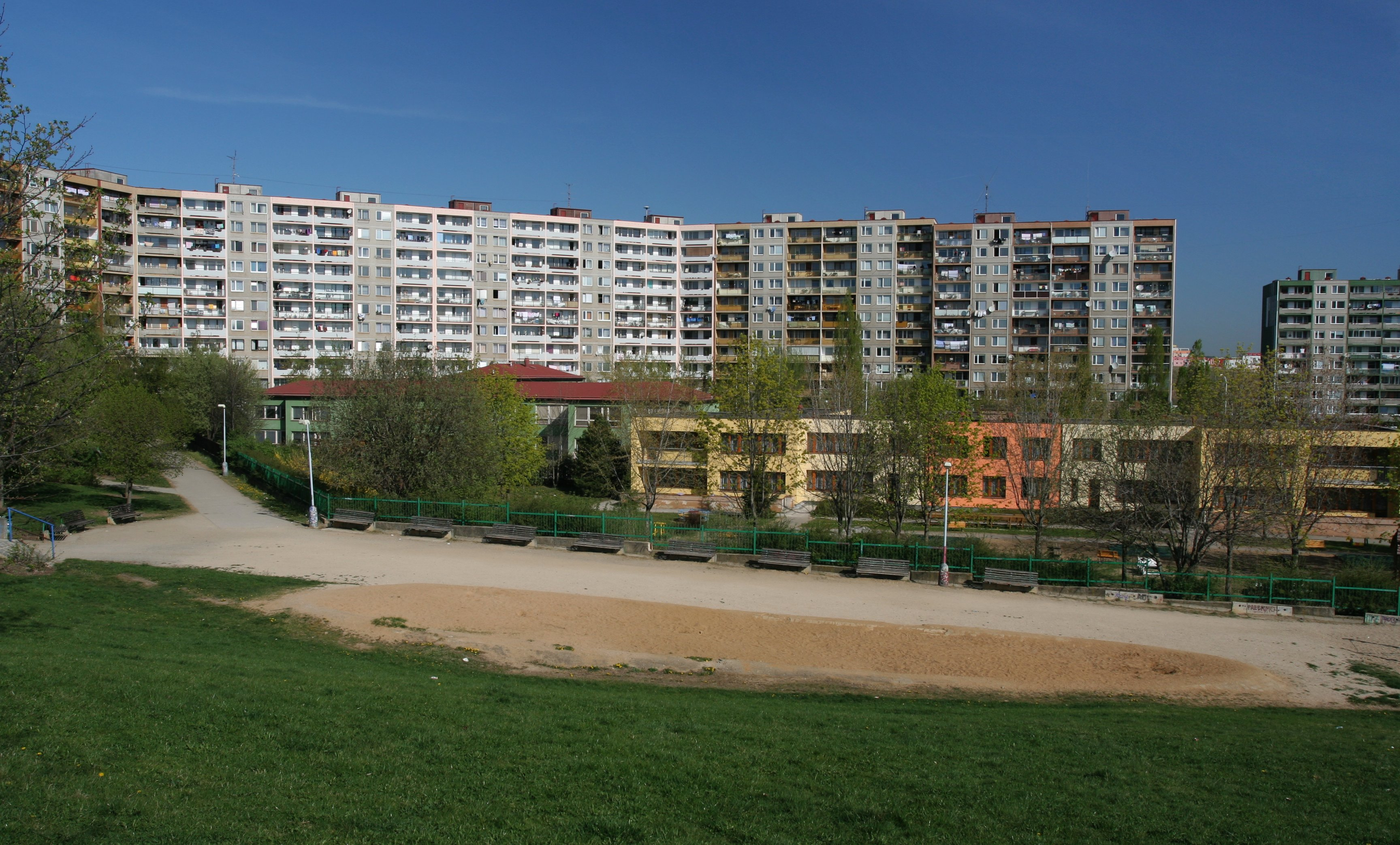 kindergarten in Lužiny